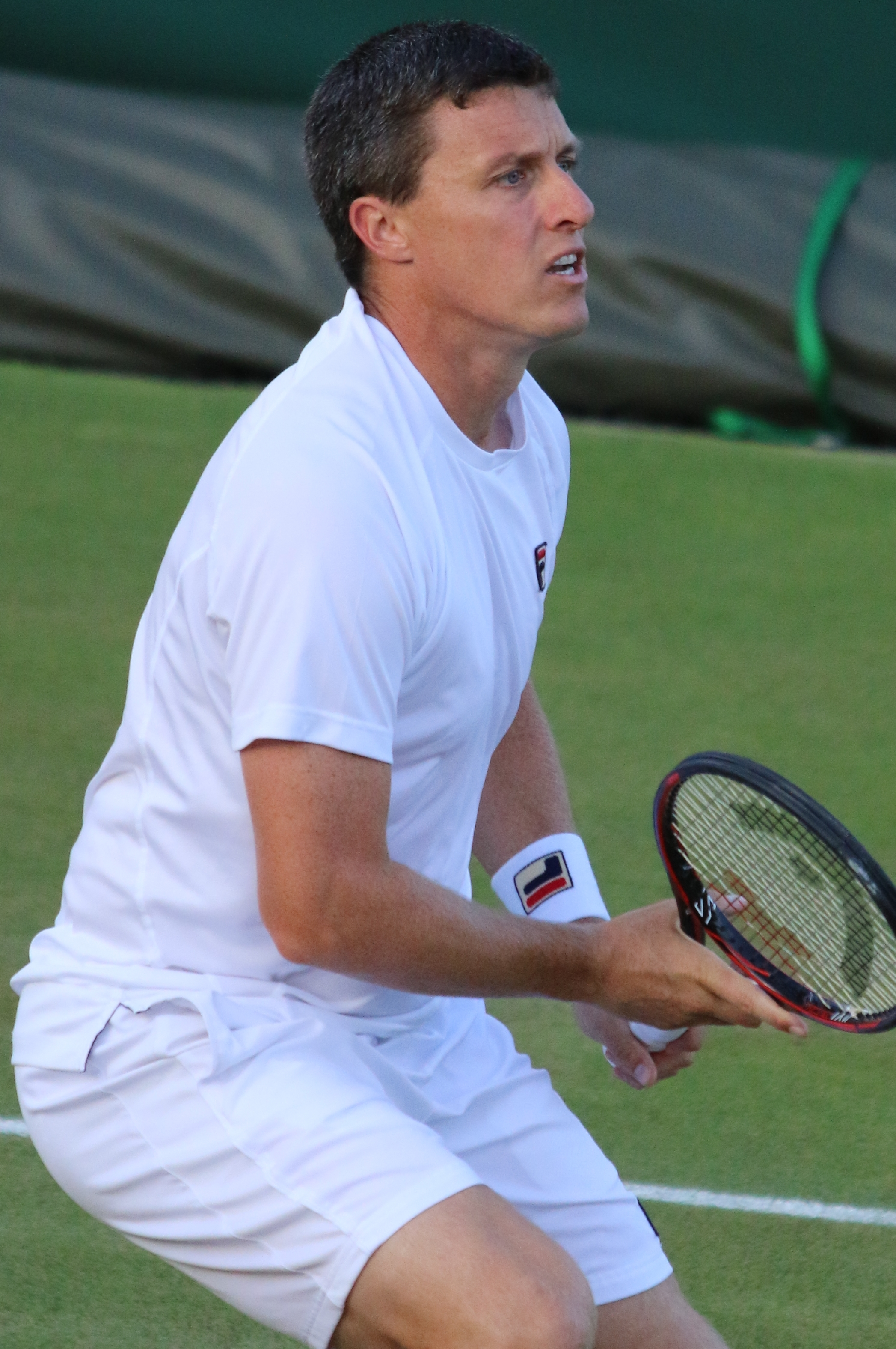 Skupski K. WM17 (23)